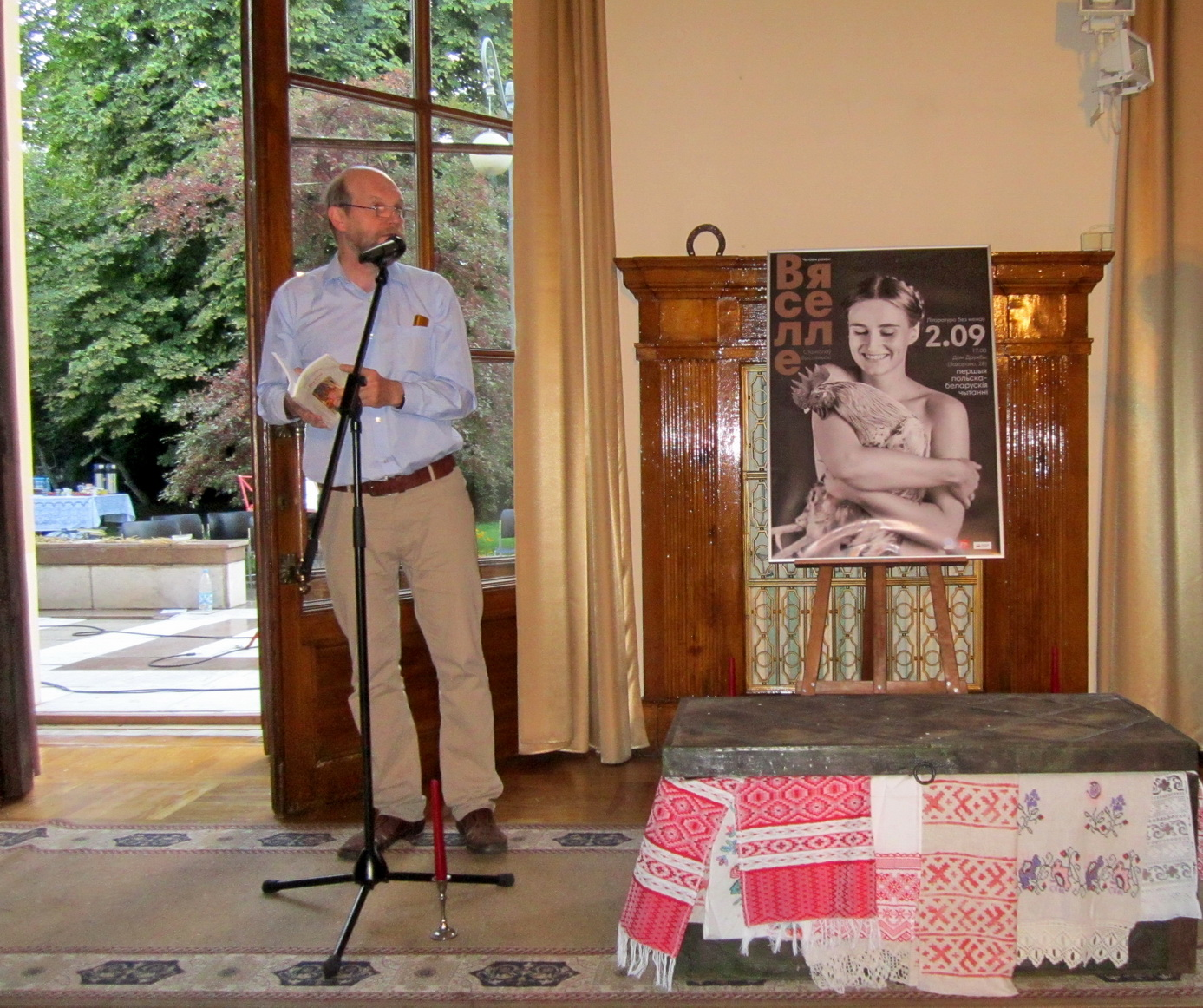 Narodowe Czytanie w Mińsku. Pierwsze wspólne polsko-białoruskie czytanie „Wesela” Stanisława Wyspiańskiego pod hasłem „Literatura ponad granicami”. Organizator - Instytut Polski w Mińsku. Swoją rolę czyta Lawson Barszczeuski (Leonid Borszczewski), tłumacz „Wesela” na język białoruski